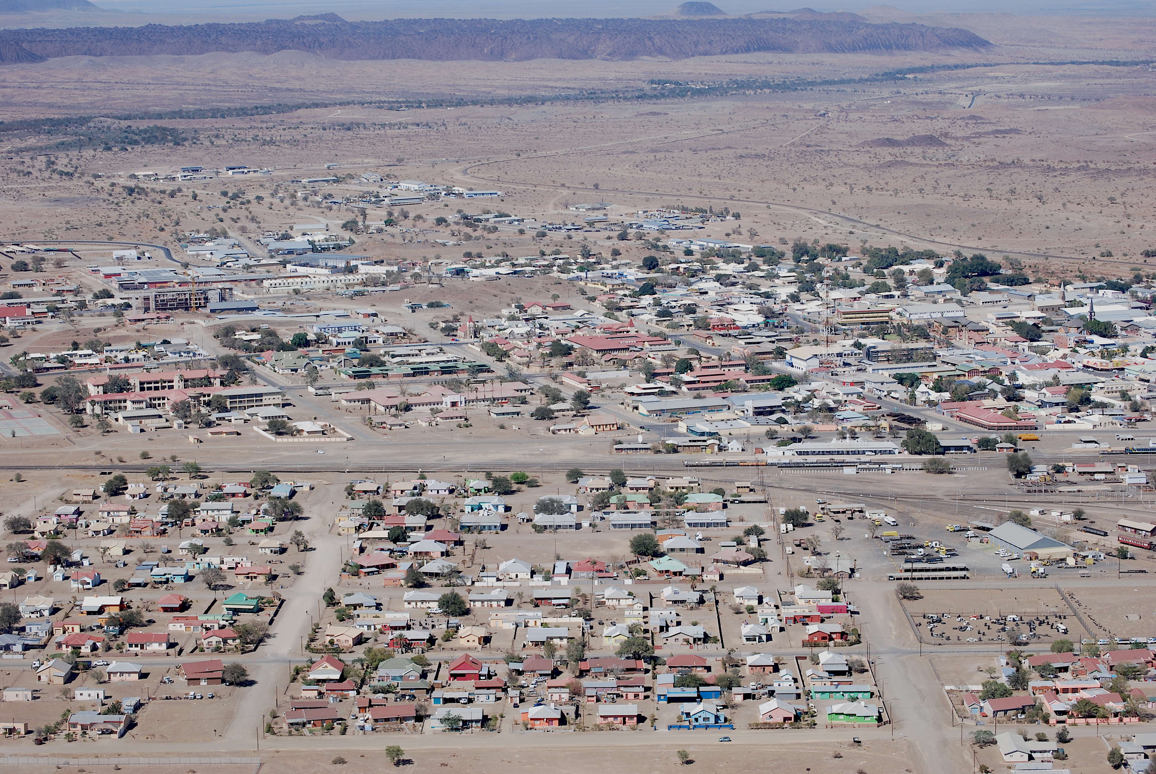 Keetmanshoop (2019)